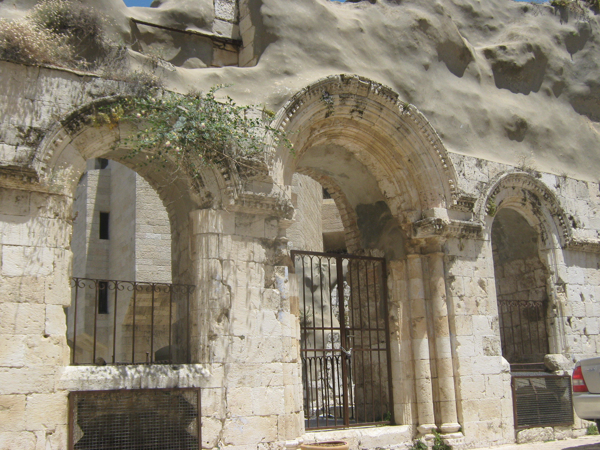 שרידי בית הכנסת תפארת ישרא \הניסן בק על שם מקימה צורת הפתח הזו נמצאה גם בבית כנסת ברעם שבגליל אך שם זהו המקור האמיתי וכאן זהו רק חיקוי של בוני בית הכנסת אשר באו מהגליל ורצו שבית כנסת זה אשר בנו ידמה לישן שהיה להם